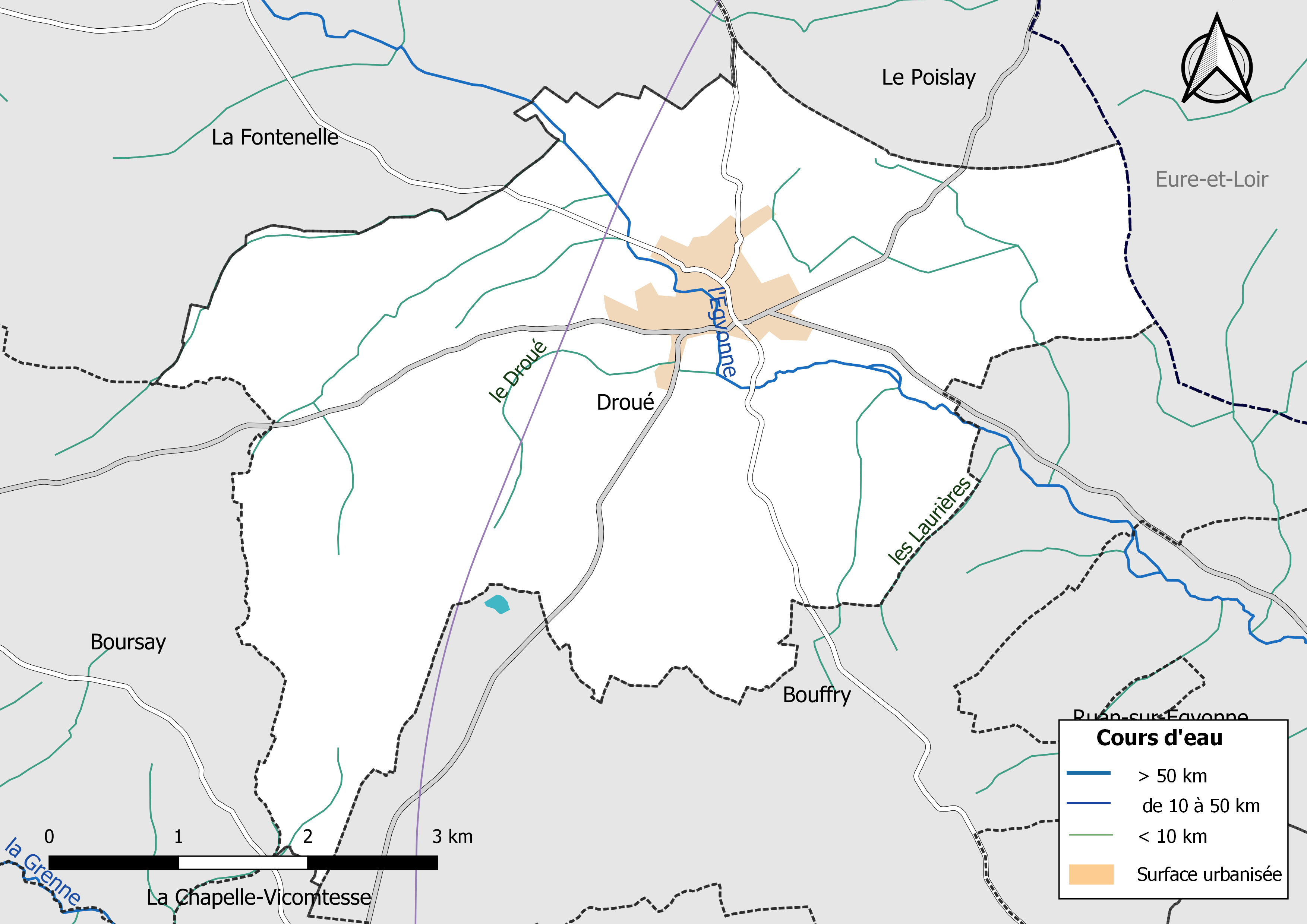 Carte du réseau hydrographique de la commune de Droué (Loir-et-Cher, France).